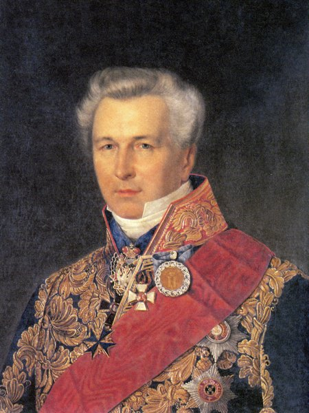 Барон Лев Карлович Боде (1787—28.04.1859)